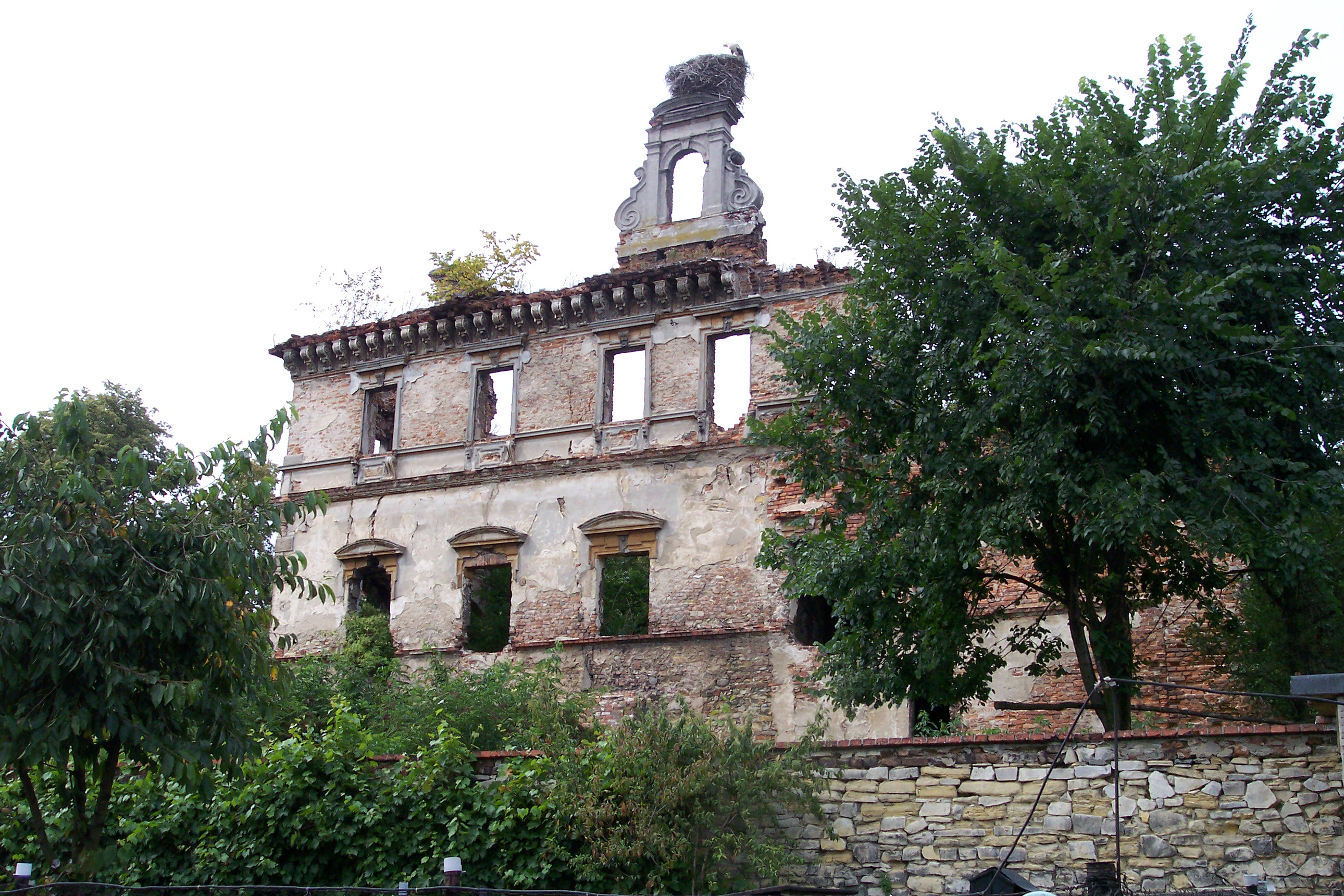 Ruiny Zamku Biskupów Wrocławskich w Ujeździe